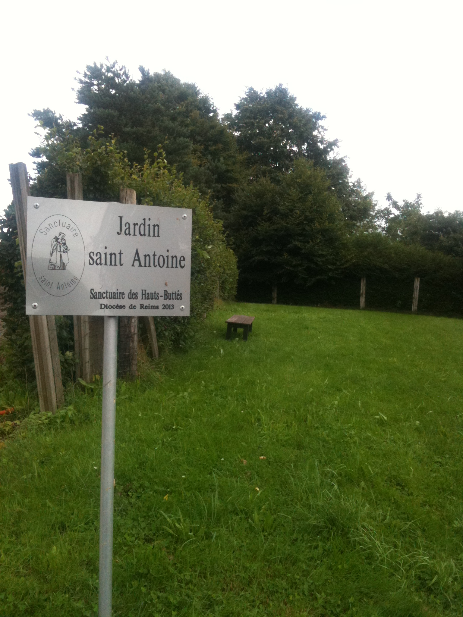 Jardin à proximité de l'église Saint-Antoine des Hauts-Buttés Ardennes France